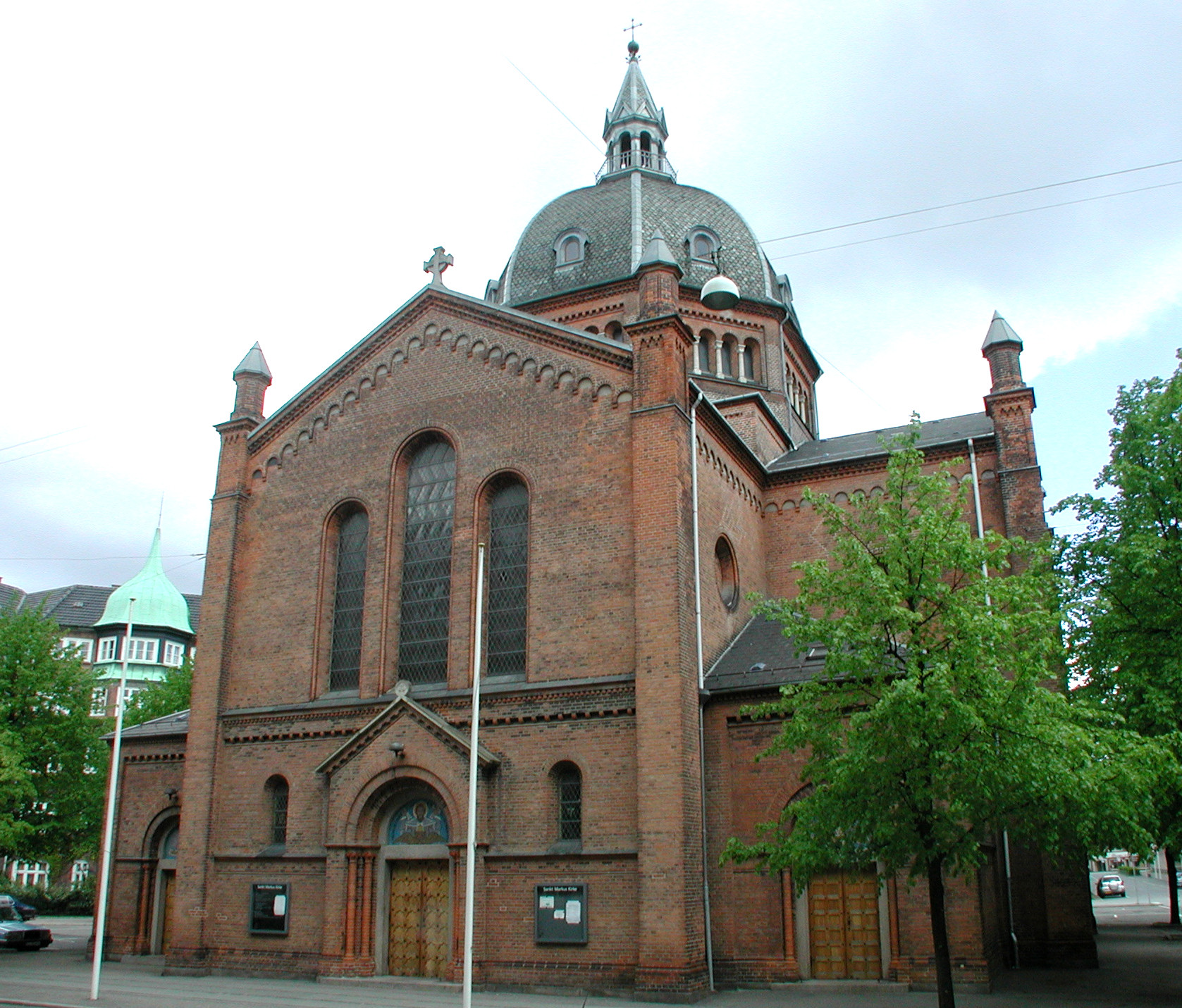 Sankt Markus Kirke in Frederiksberg, Copenhagen, Denmark.